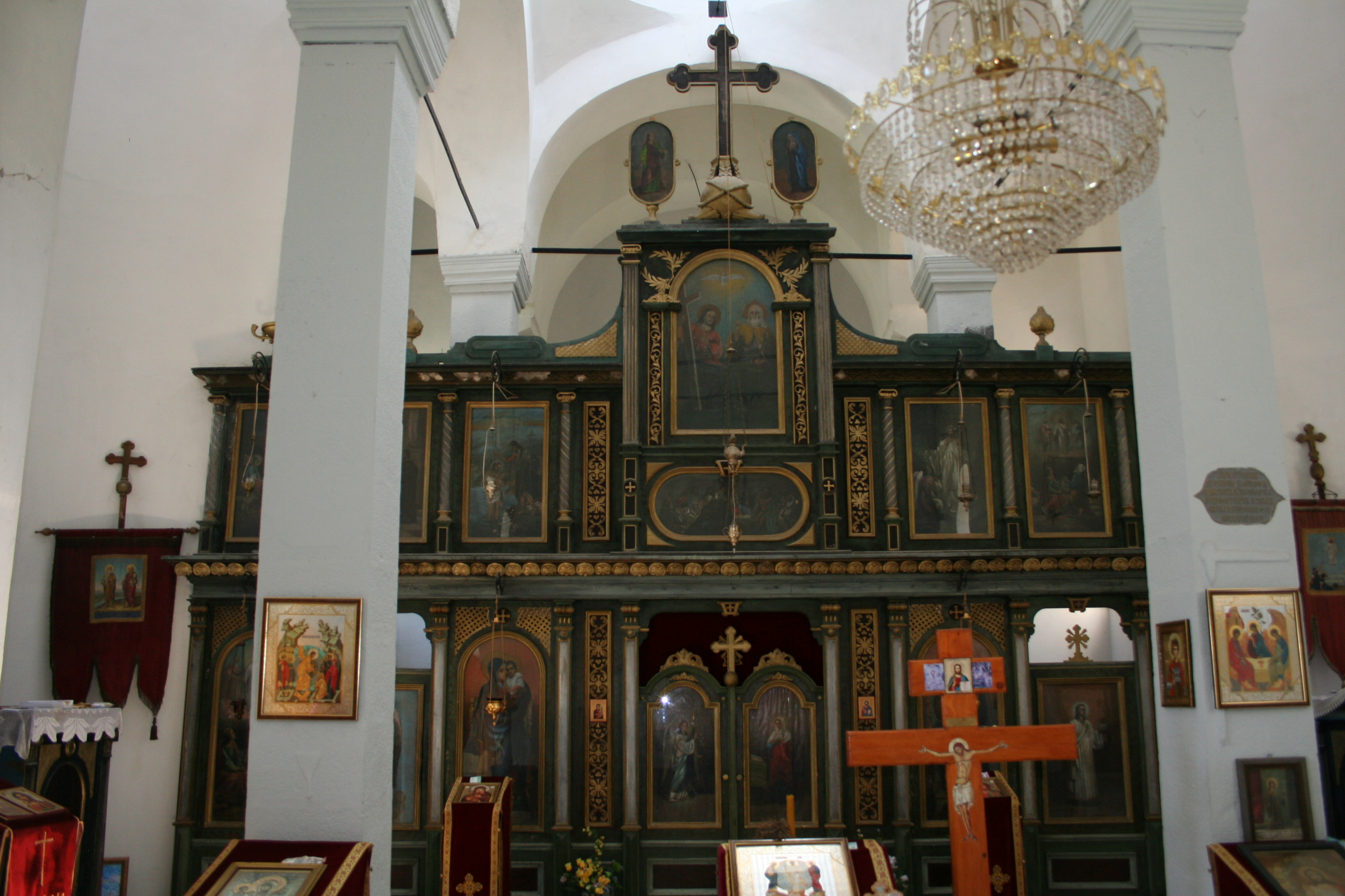 Crkva Preobraženja Gospodnjeg, Krivaja